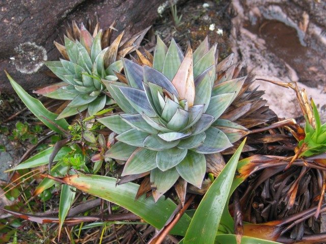 Orectanthe sceptrum at Roraima-Tepui, Venezuela.